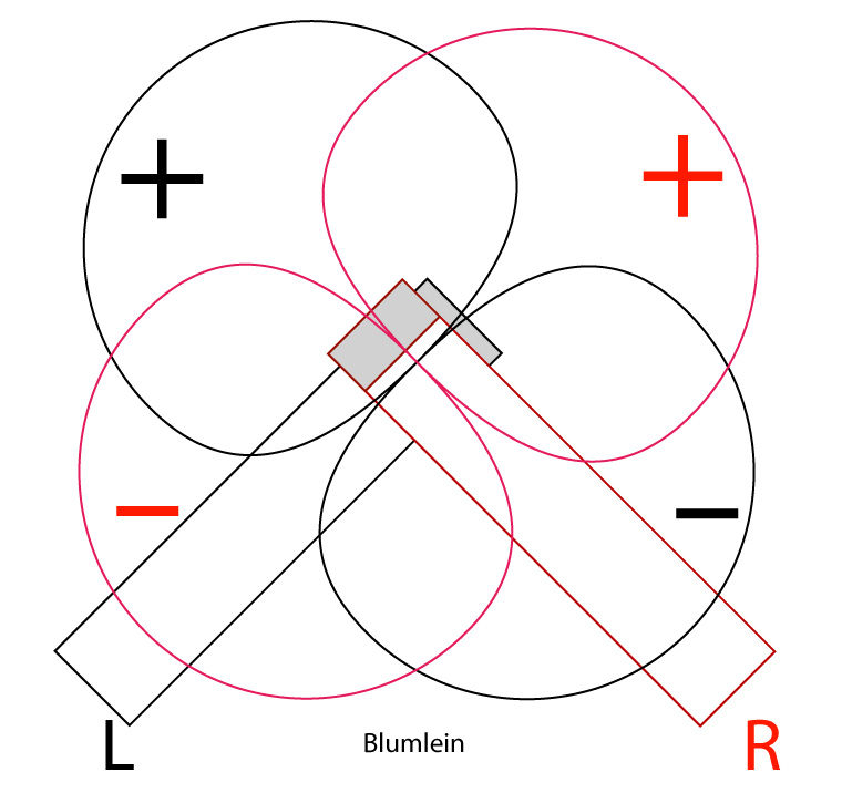 Blumlein stereo microphones